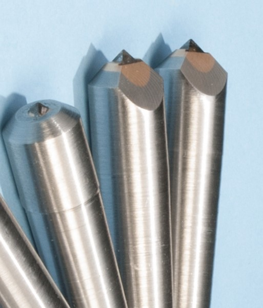 כלי יהלומים מתוצרת דיאפוינט כלי יהלומים. כלי יהלום בנוי להחזקה על ידי מחרטה או כרסומת וכולל חוד יהלום אשר מאפשר עיבוד או ליטוש של חומרים קשים תוך שימוש בקושי של יהלום, החומר הקשה ביותר אשר בנמצא.